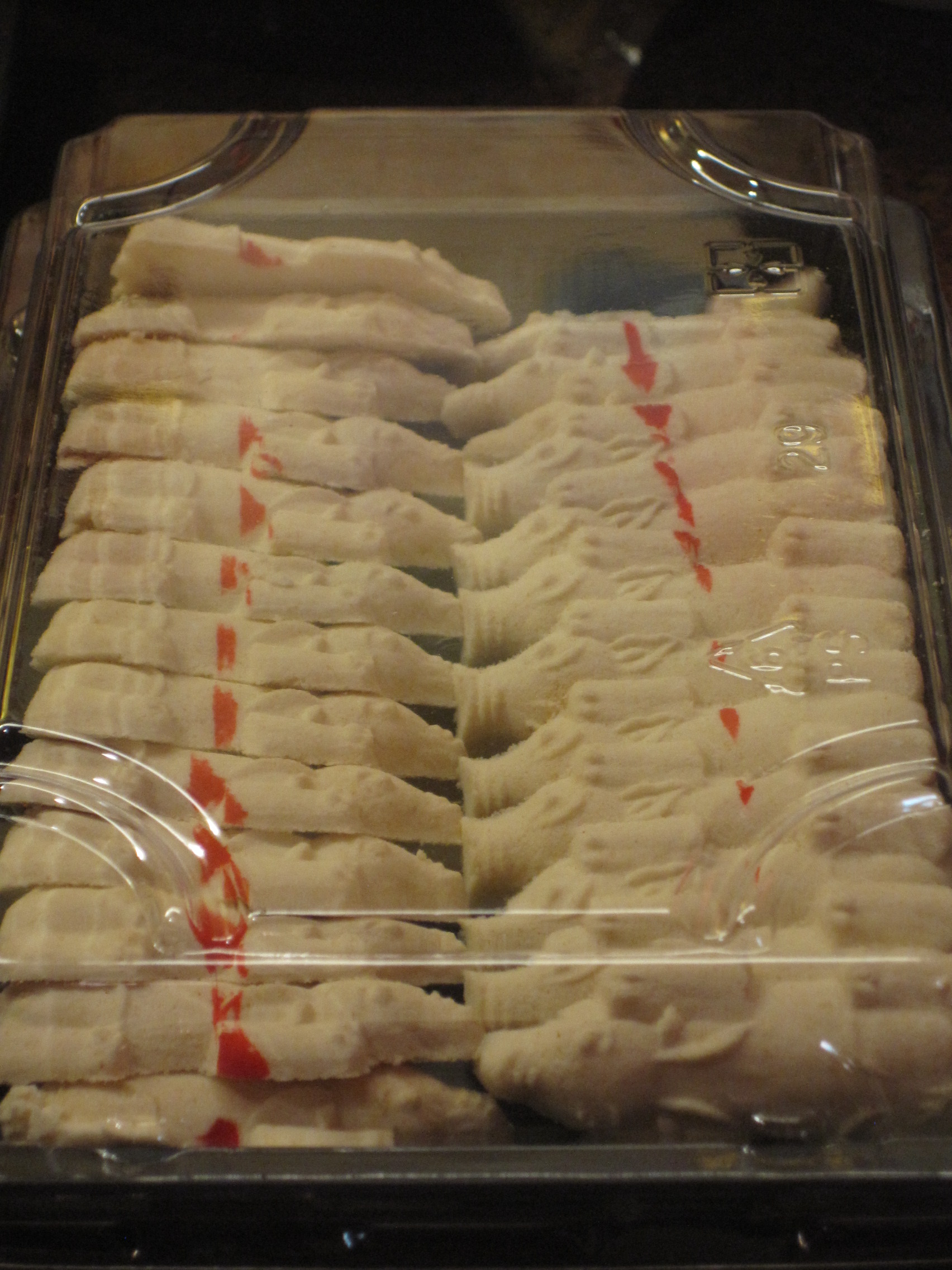 開基三官廟的九豬十六羊